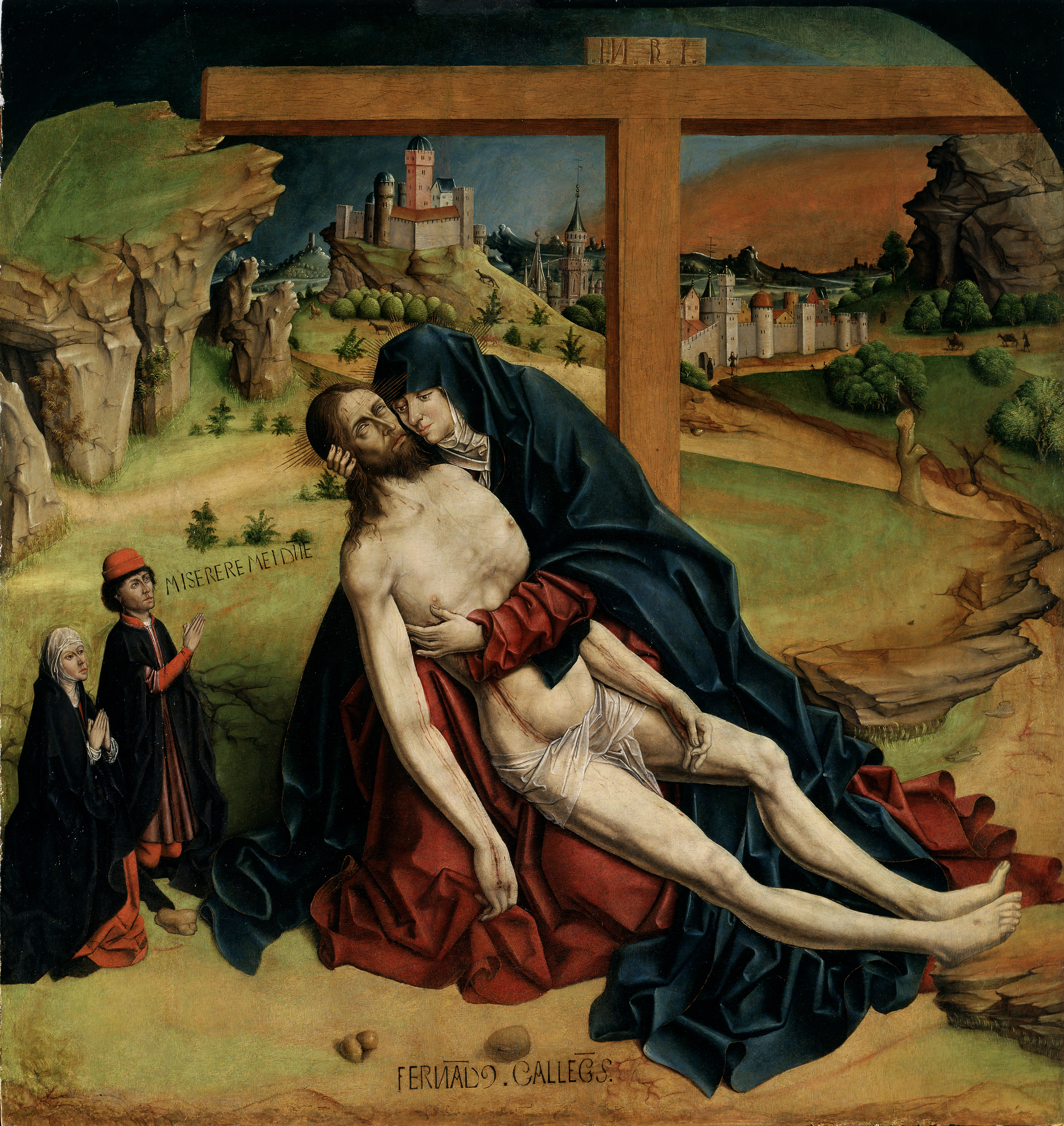 La obra representa a Jesucristo muerto y en los brazos de su madre, la Virgen María, mientras que por detrás que ellos aparece la cruz en la que había sido crucificado cristo y la ciudad de Jerusalén.